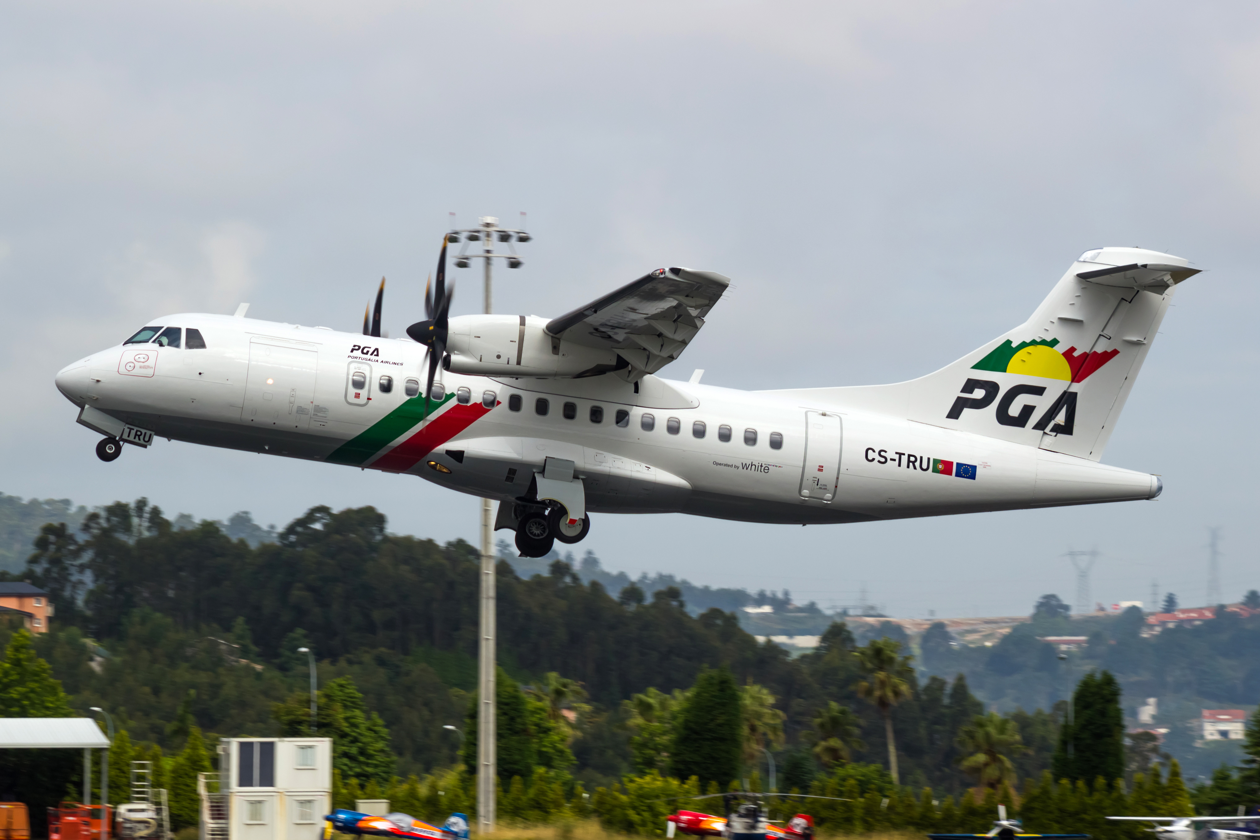 ATR-42 de Portugália despegando do aeroporto da Coruña.